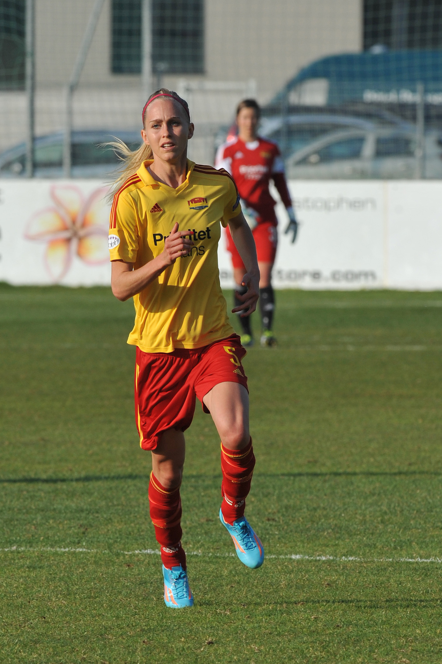 UEFA Women's Champions League 2013/14 SV Neulengbach - Tyresö FF Neulengbach, 29. März 2014 Line Røddik Hansen